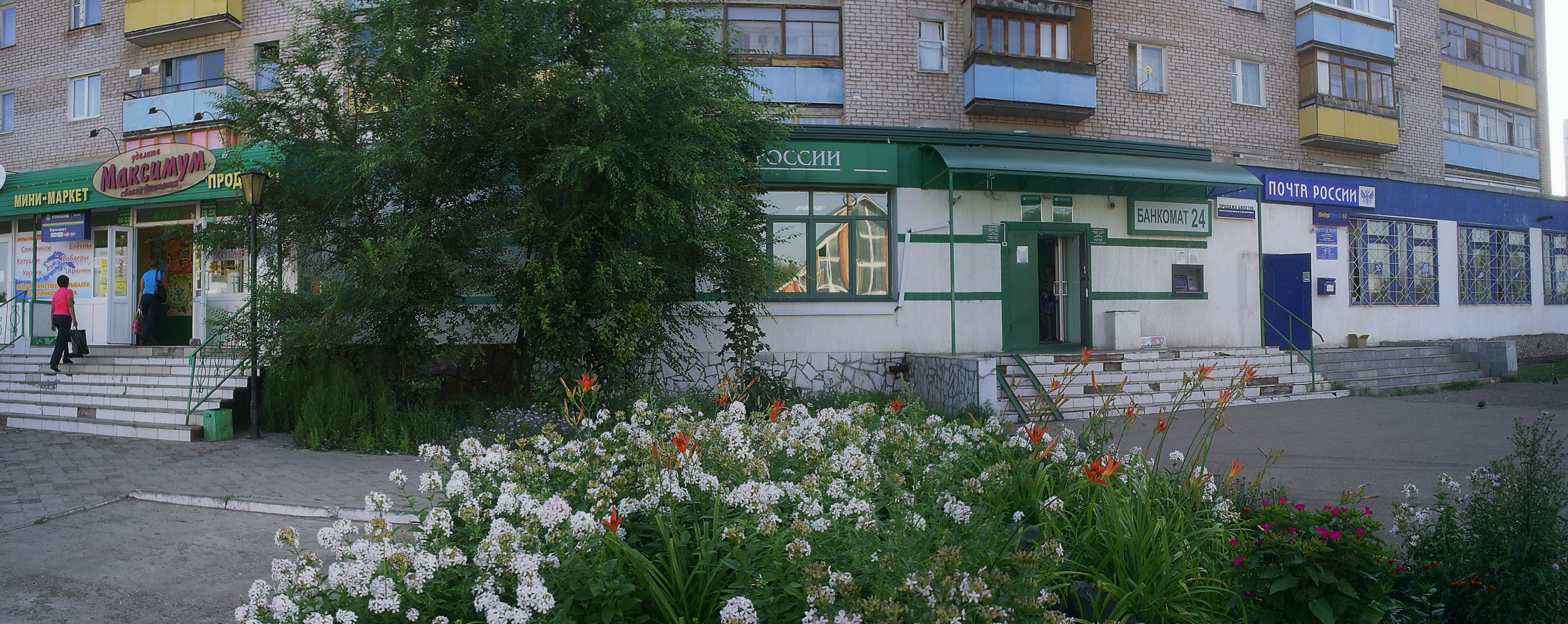 Дом 16 по ул. Стахановская в Ишимбае. Отделение Сбербанка